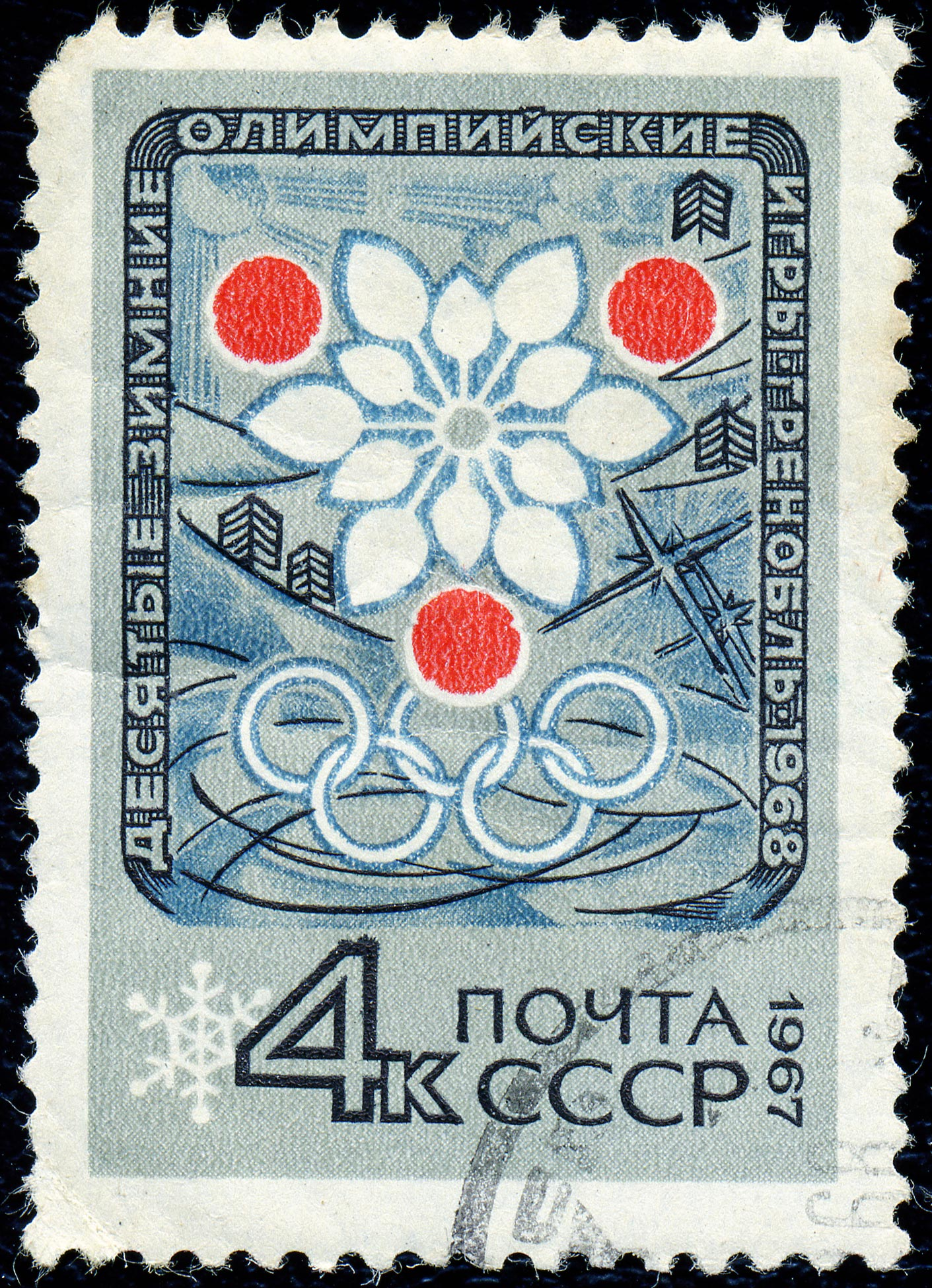 Почтовая марка СССР. 1967. X зимние Олимпийские игры